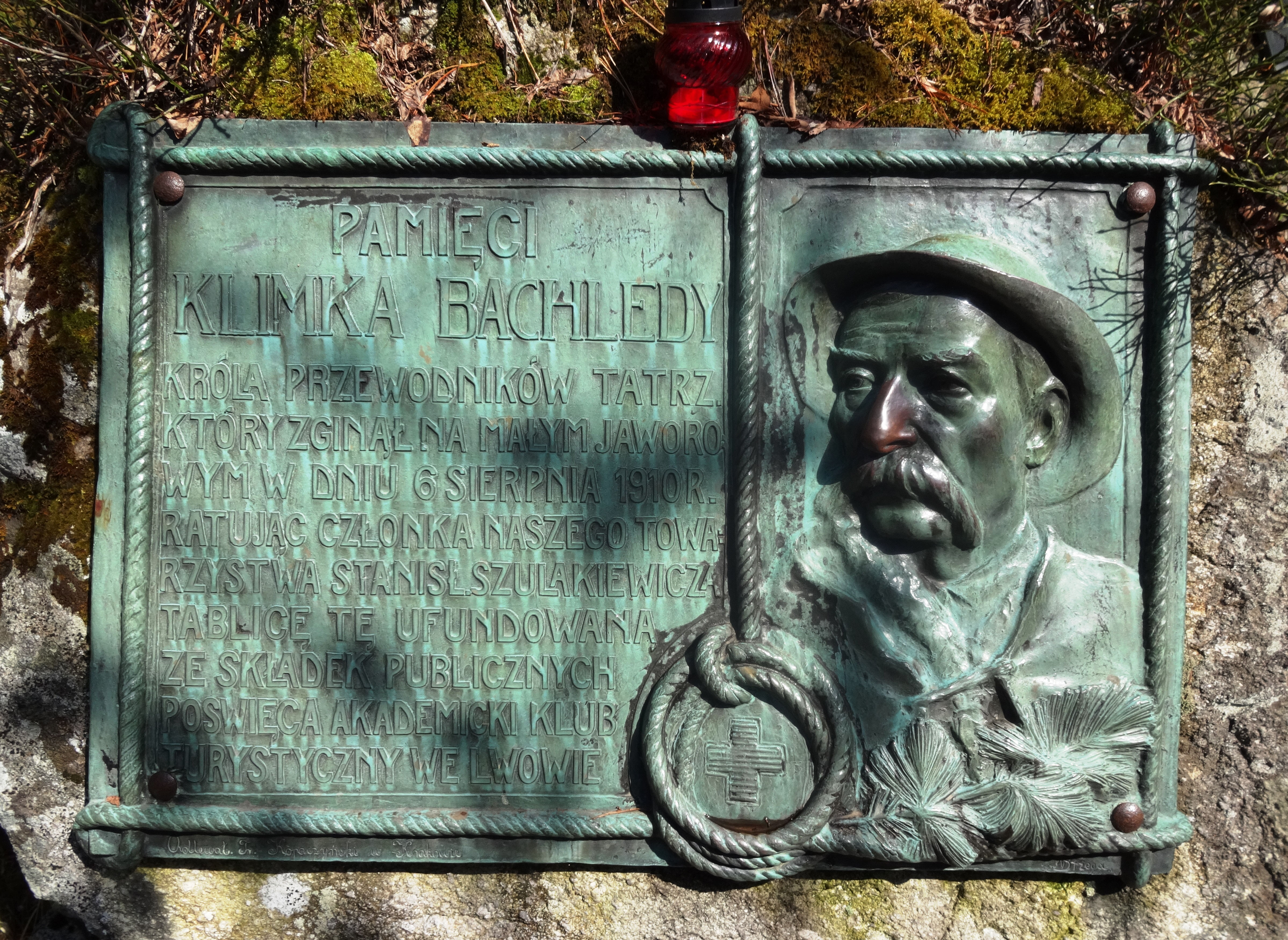 Tatrzański Cmentarz Symboliczny